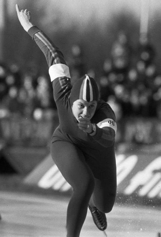 Wereldkampioenschap schaatsen dames te Heerenveen. Sippie Tigchelaar in actie.